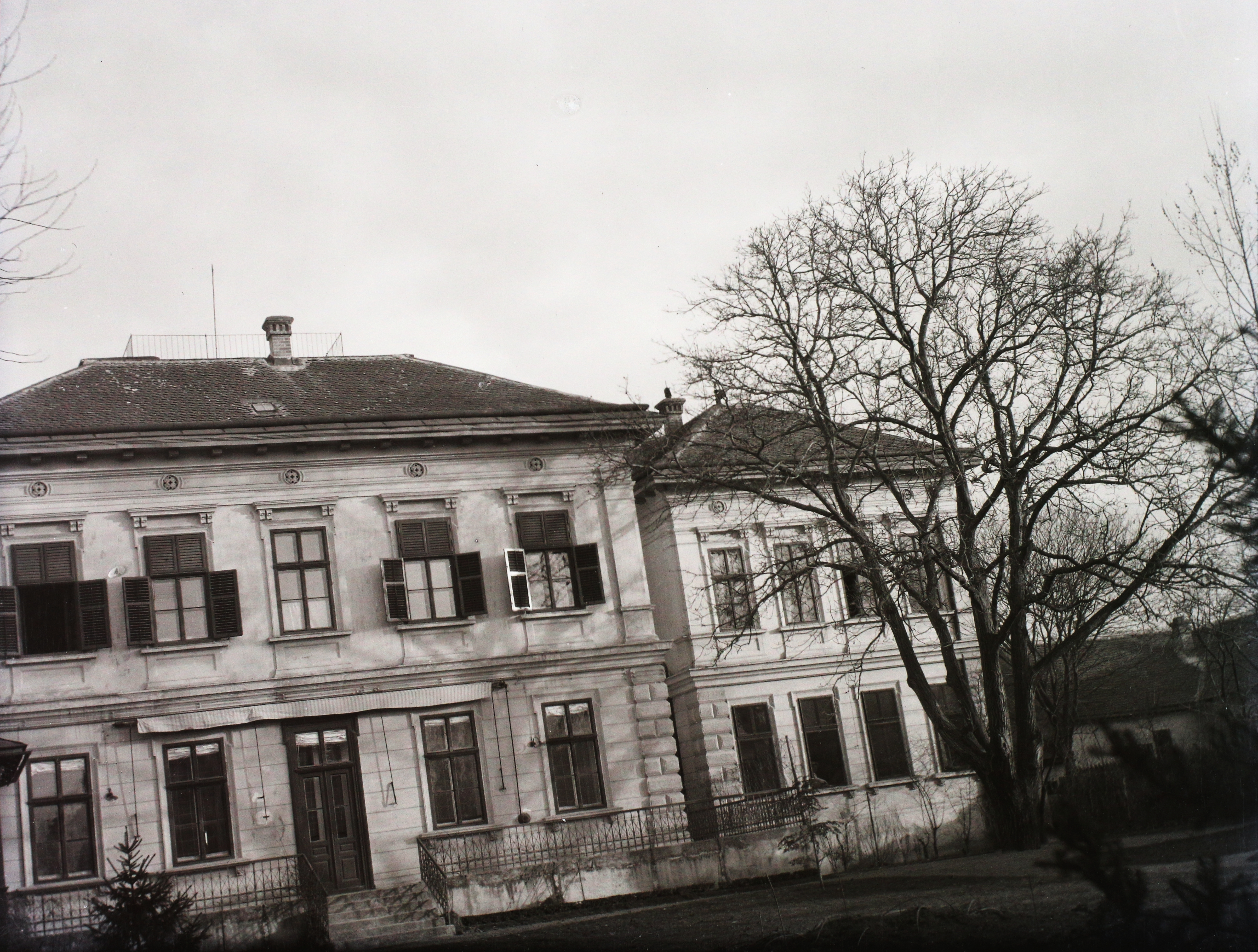 Svetozara Markovića 20., az Osztrák–Magyar Monarchia nagykövetsége (később Érseki palota). Location: Serbia, Belgrade Tags: bishop's palace Title: Svetozara Markovića 20., az Osztrák–Magyar Monarchia nagykövetsége (később Érseki palota).